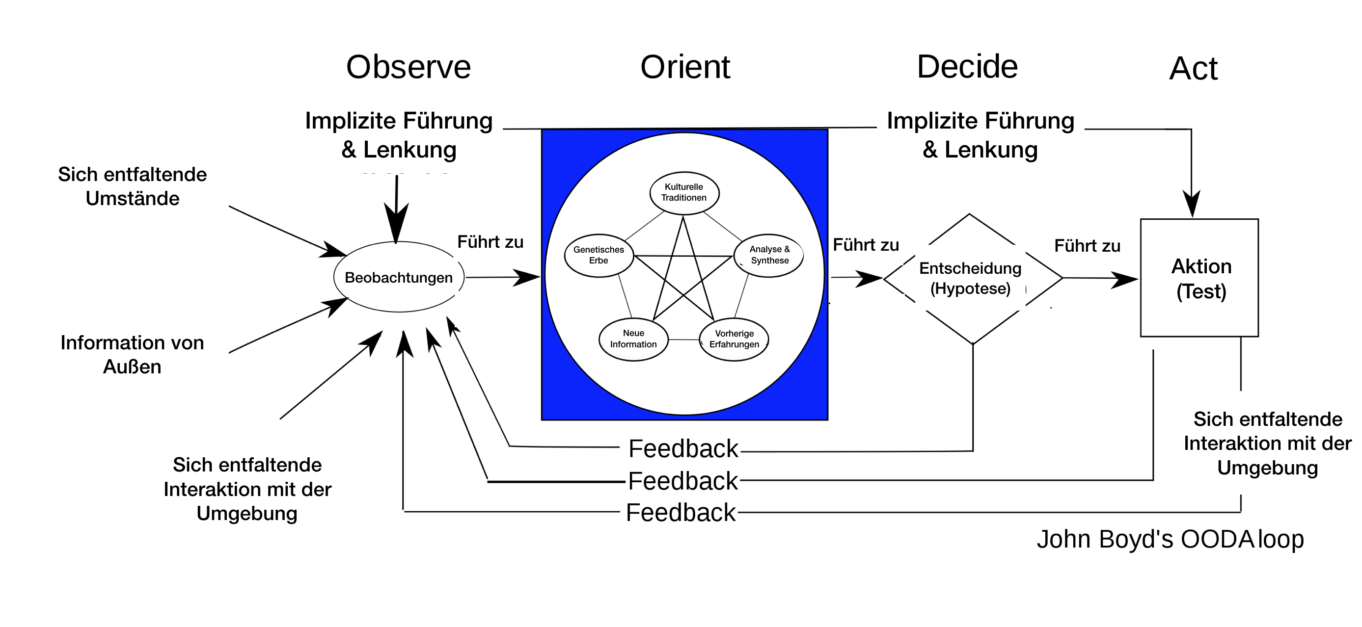 Deutsche Fassung der OODA-Loop nach